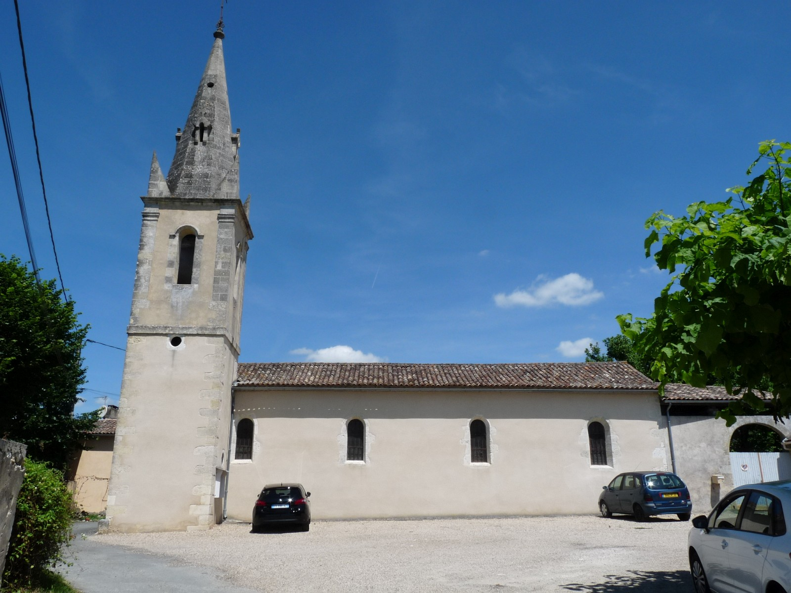 Eglise de St-André, St-André-et-Appelles, Gironde, France